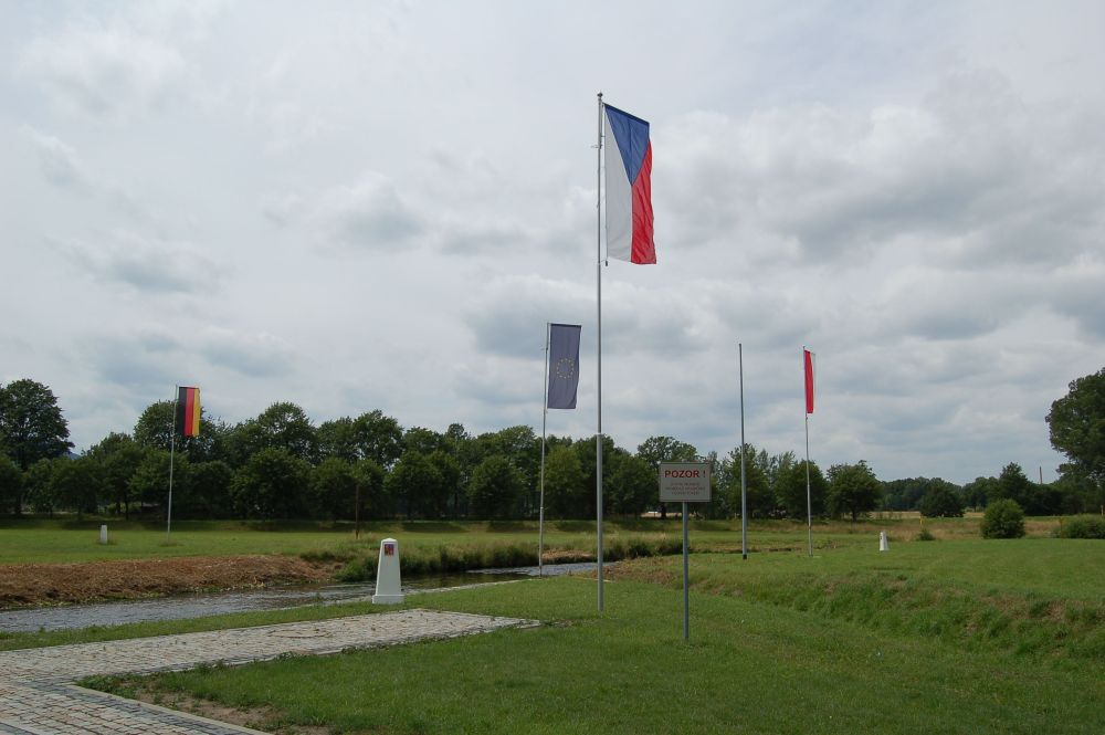 Trojzemí v Hrádku nad Nisou při ústí Oldřichovského potoka do Lužické Nisy